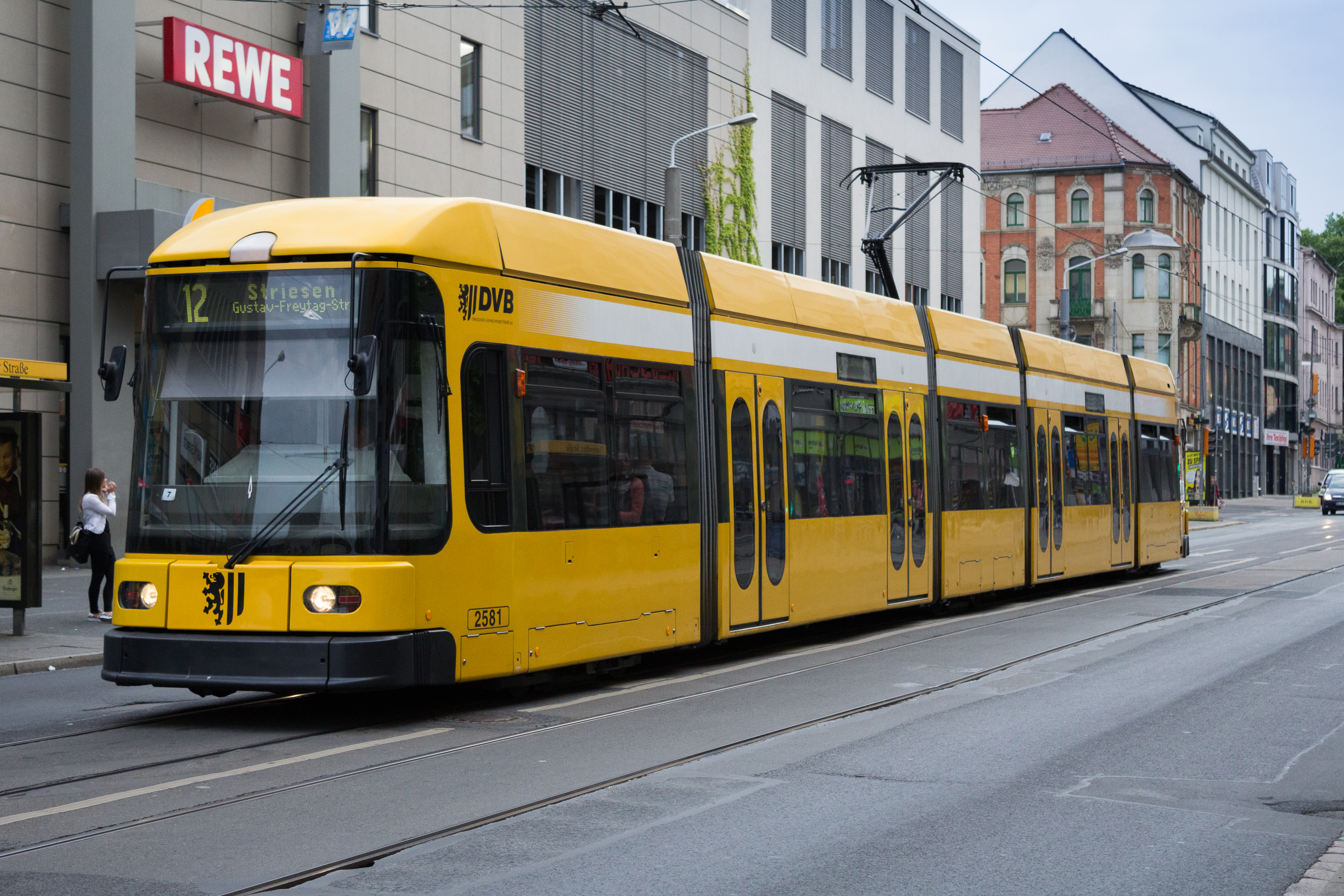 Straßenbahnwagen 2581 Dresden